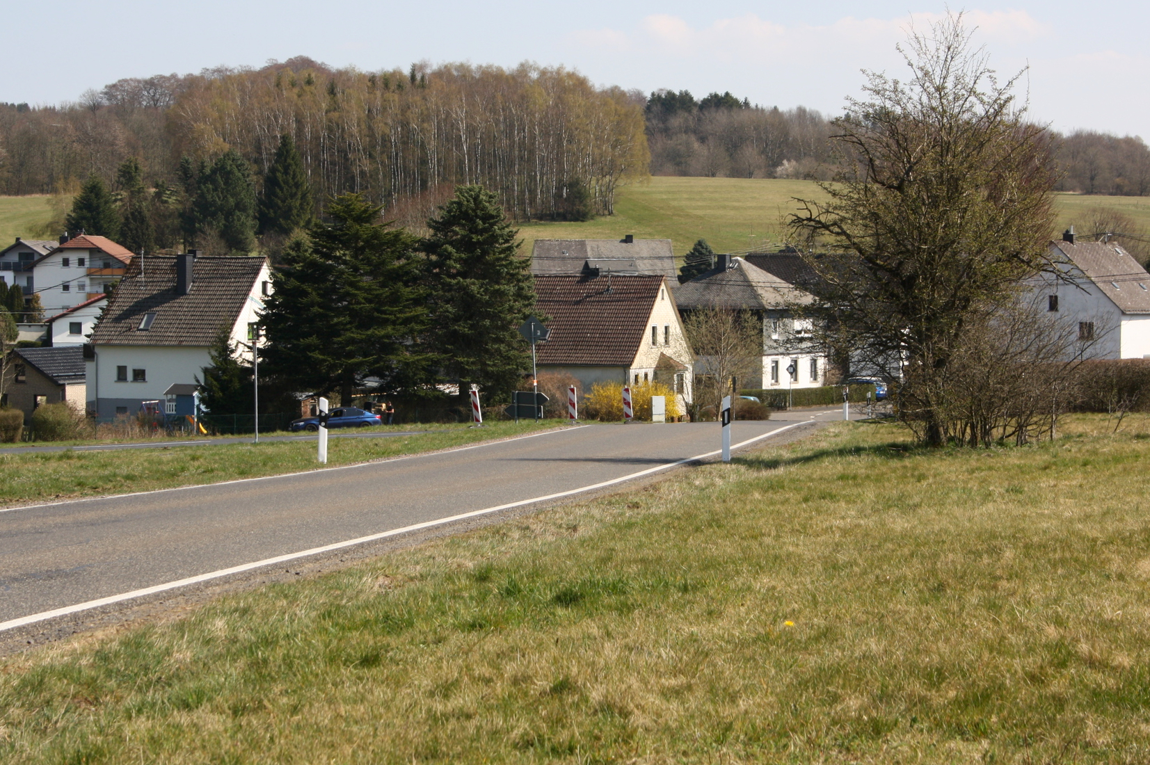 Bellingen, Westerwaldkreis, Rheinland-Pfalz, Deutschland